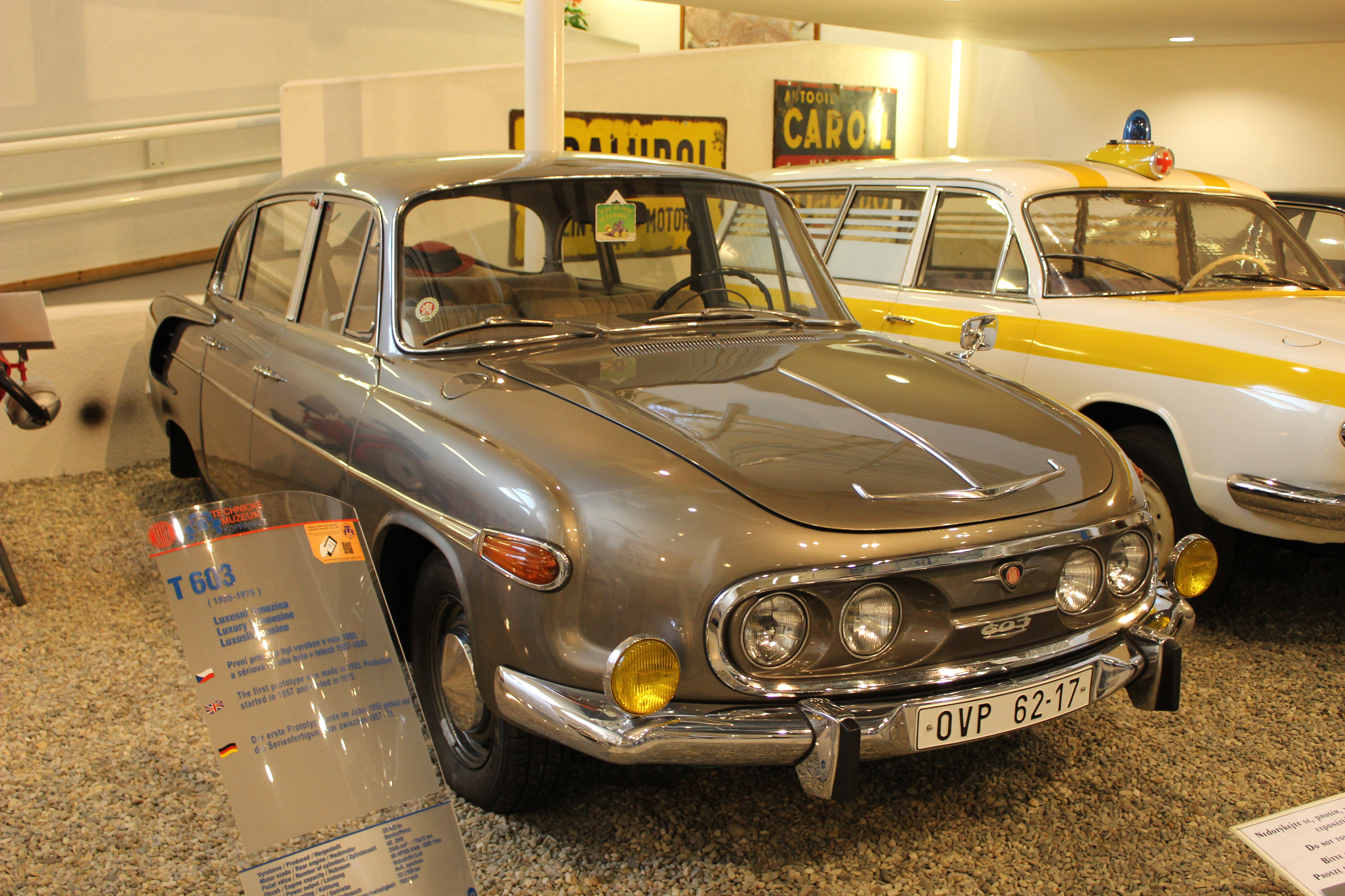 Exponát vystavený v Technickém muzeu Tatra, součásti Regionálního muzea v Kopřivnici. This image was acquired during the event Wikiměsto Kopřivnice.